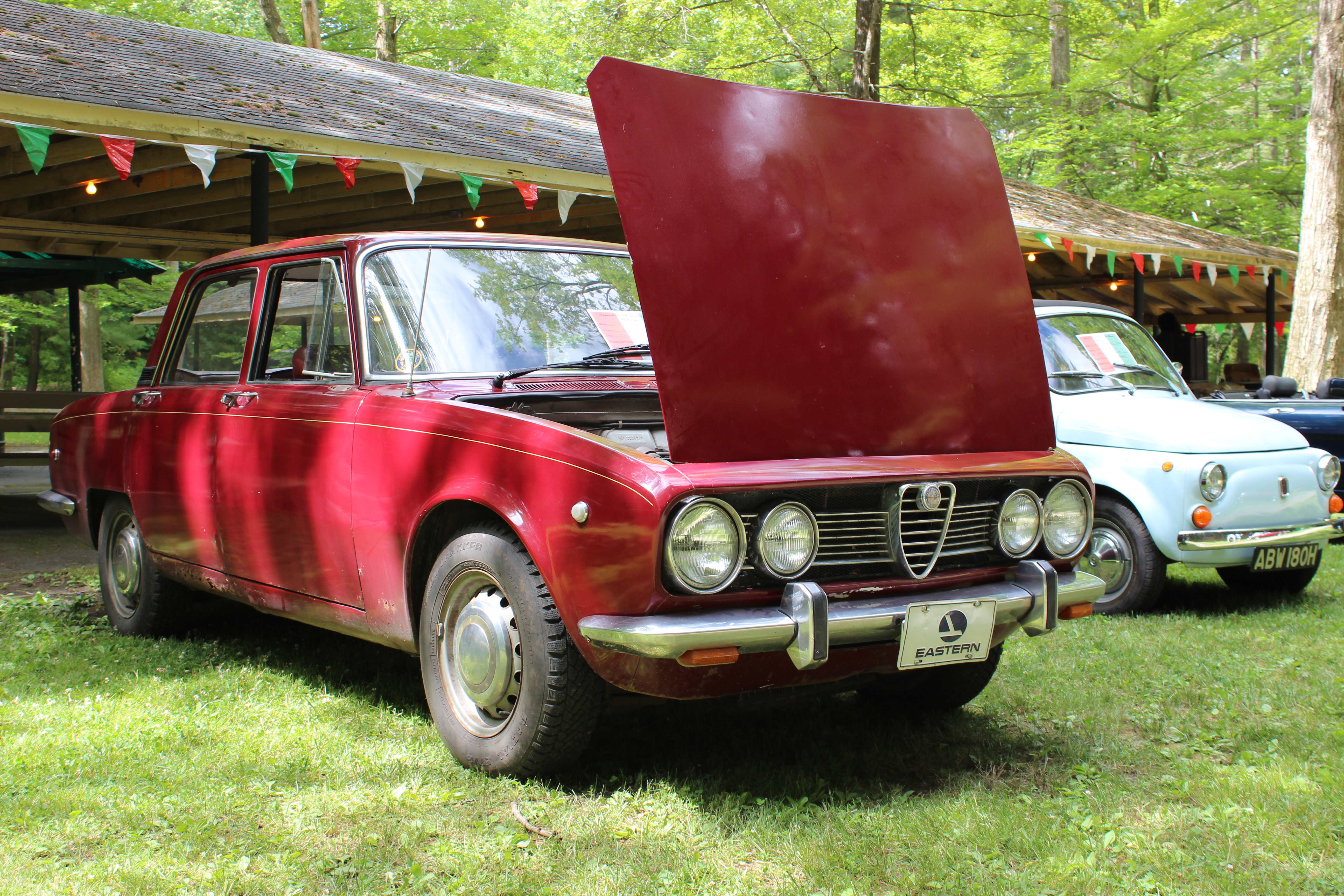 Alfa Romeo Berlina